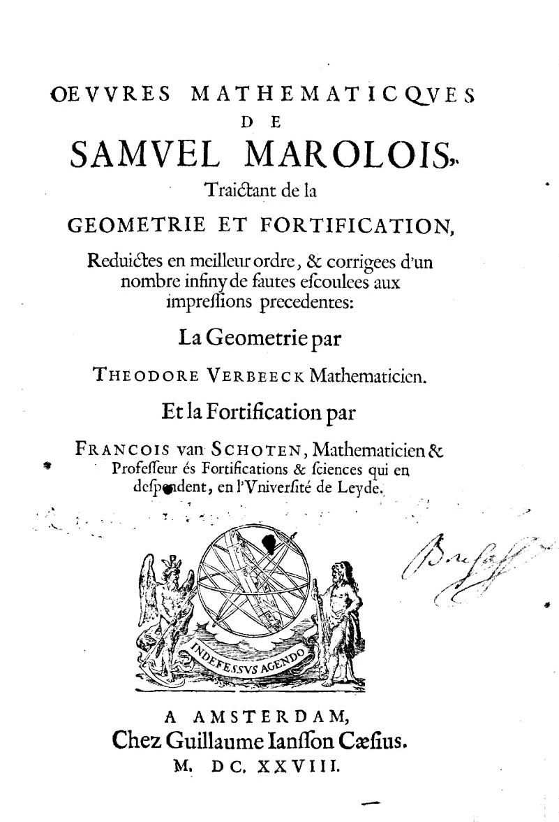 Frontespizio